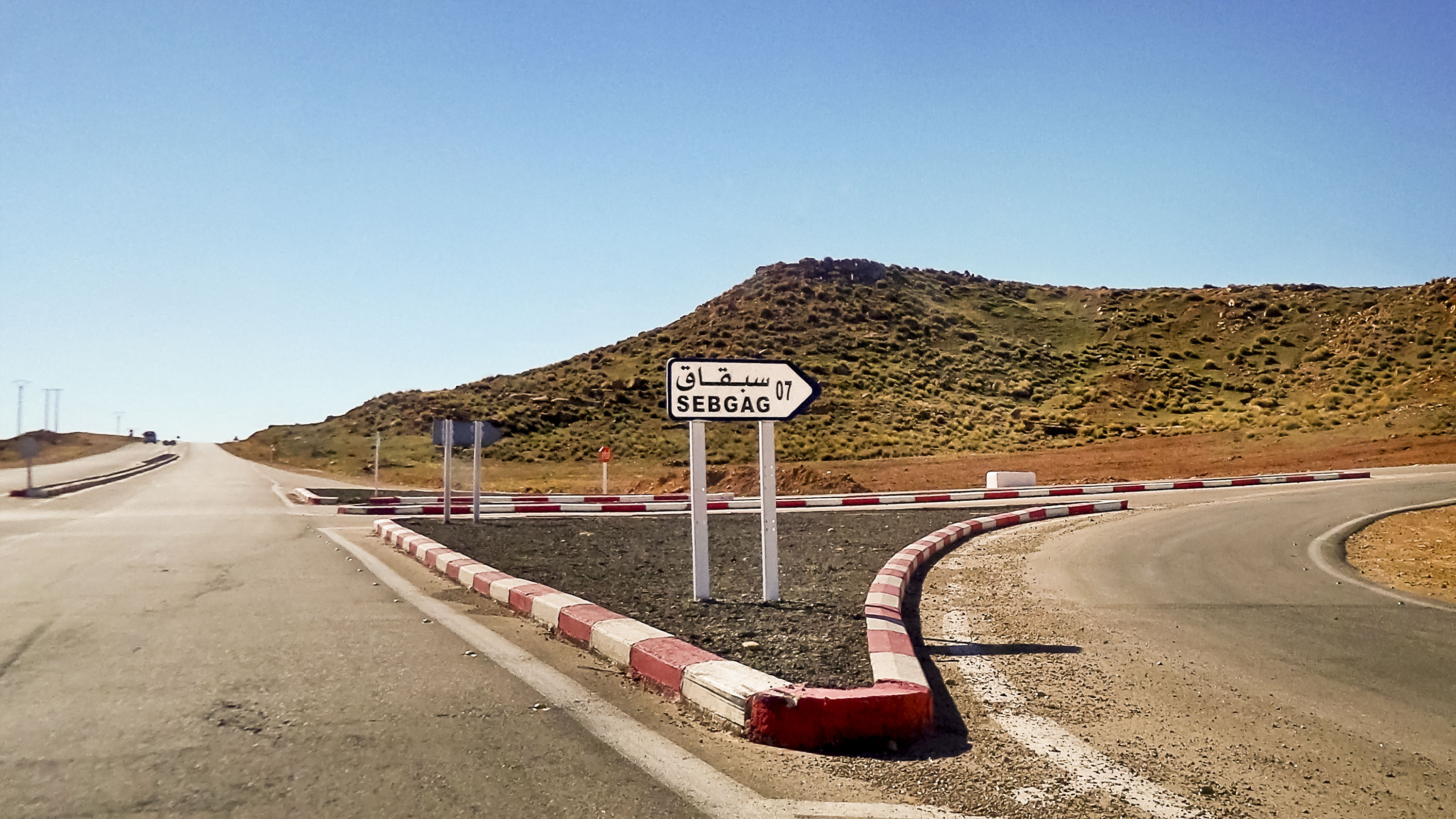 Sebgag, wilaya de Laghouat سبقاق، ولاية الاغواط